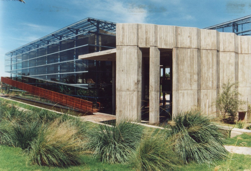 Ingreso al Jardín Botánico